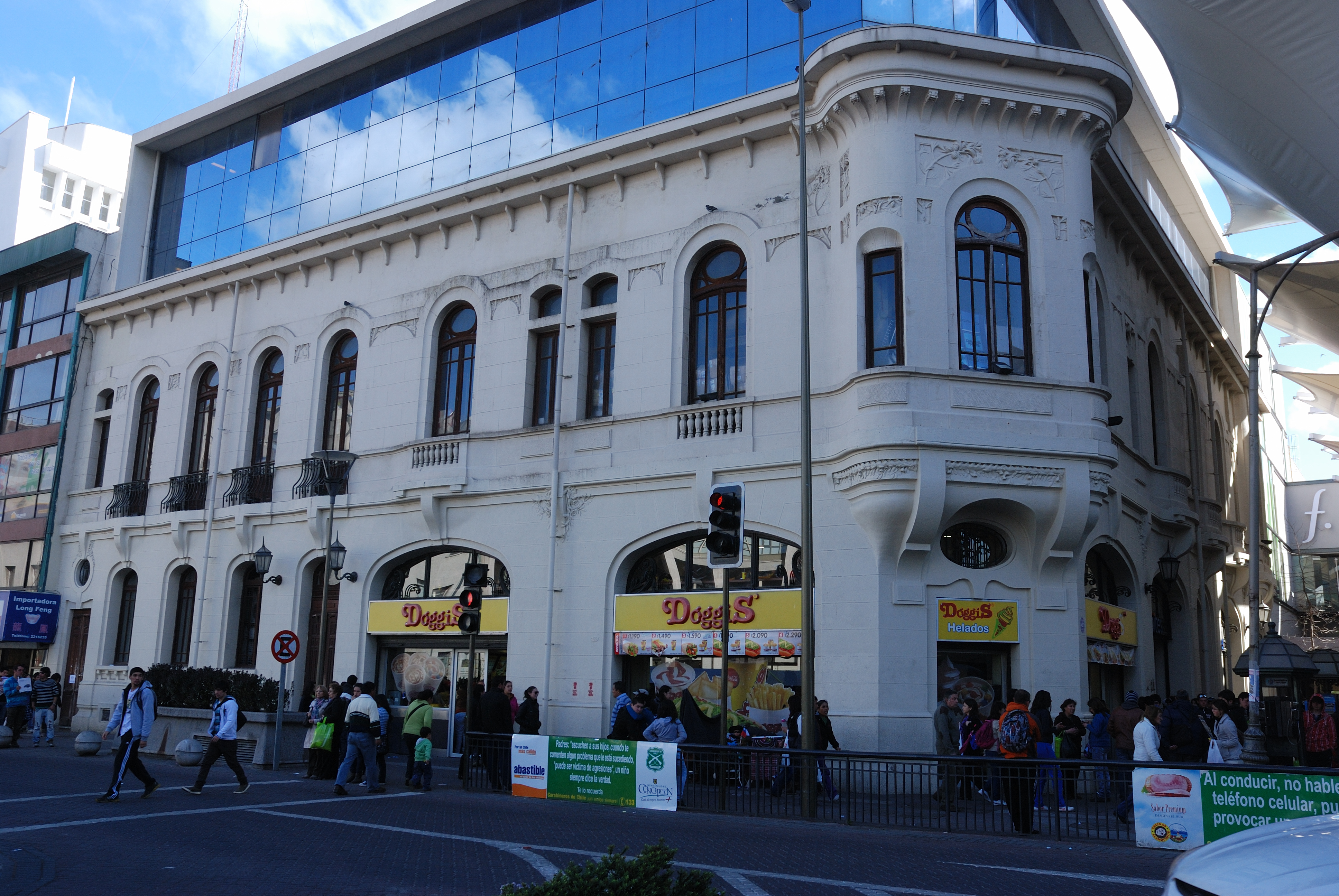 Casa de Pedro del Río, lado Castellón This is a photo of a national monument in Chile: 1438